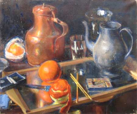 Nature-morte aux oranges et chaudron de cuivre